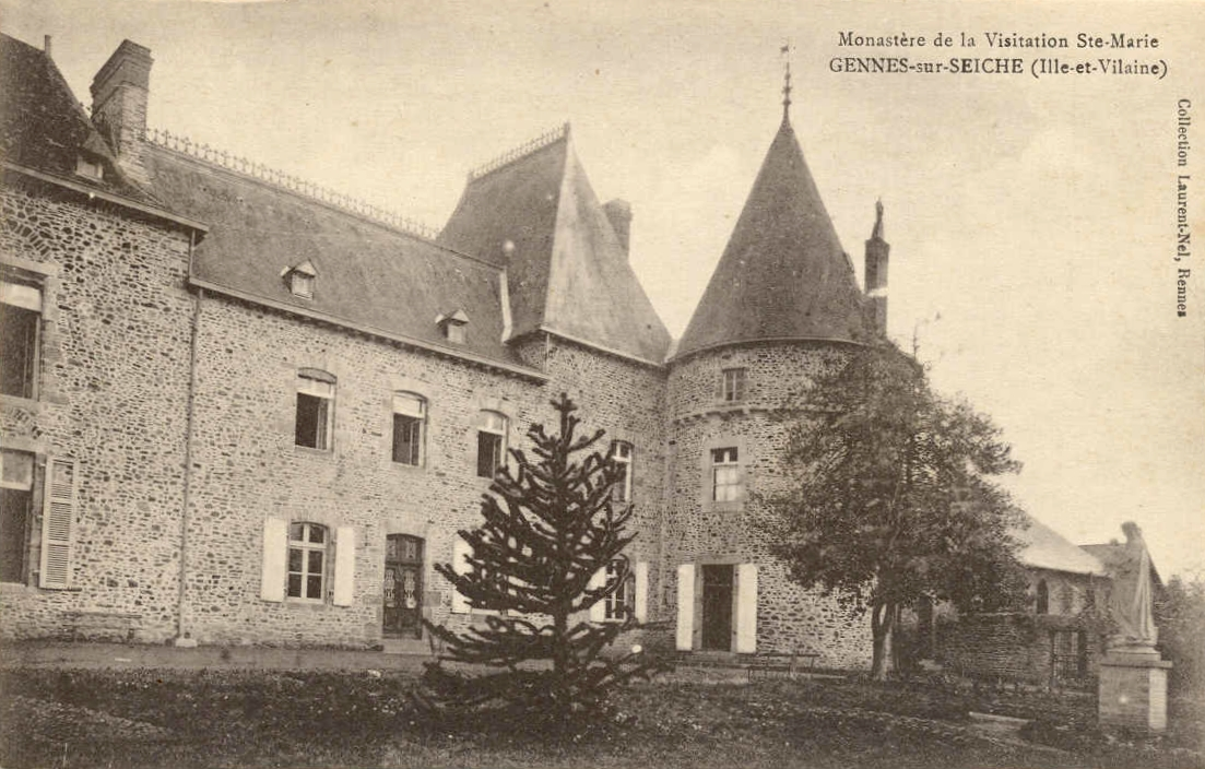 Gennes-sur-Seiche - Chateau de la Motte